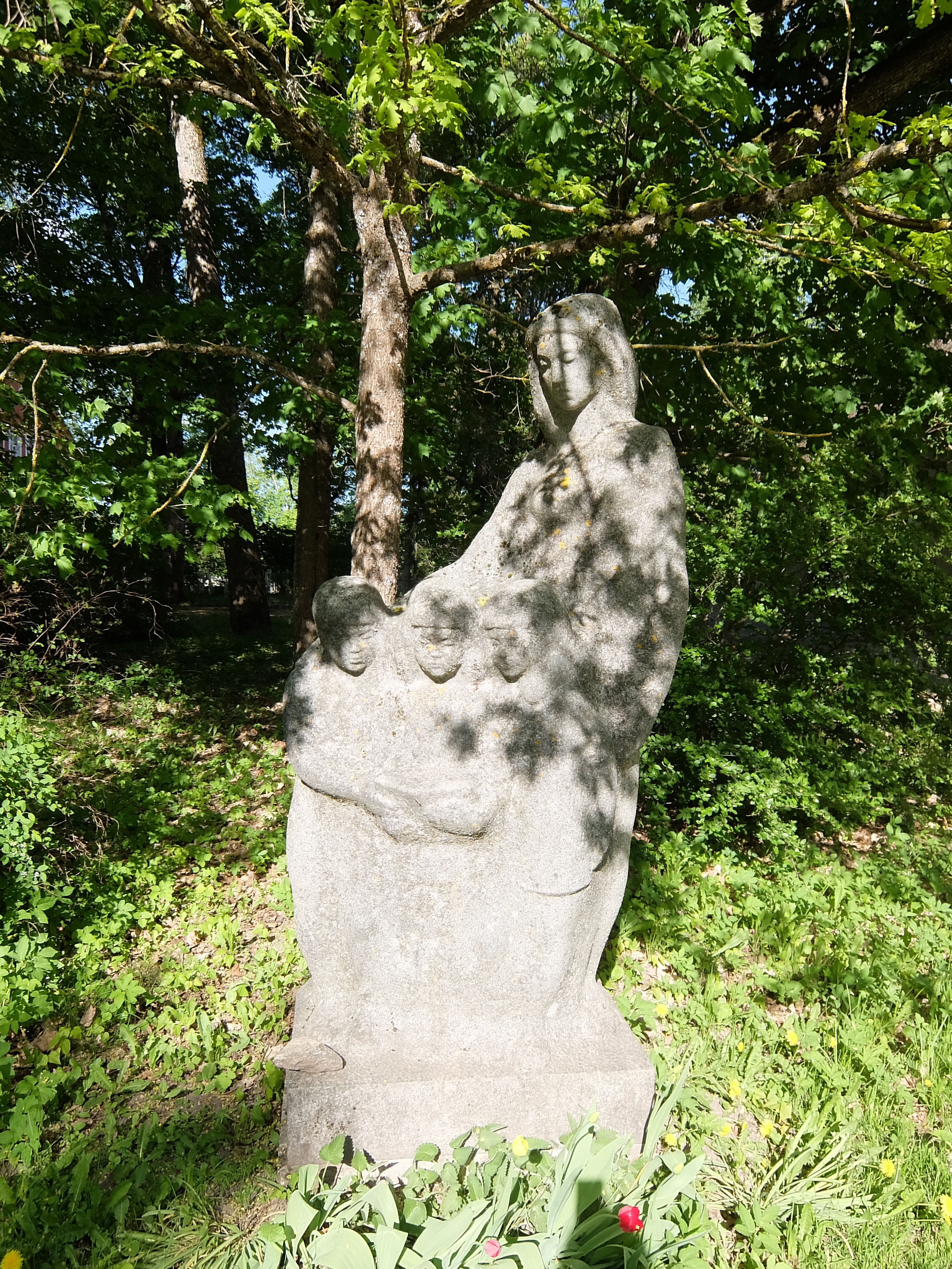 Skulptuur "Mängivad lapsed"